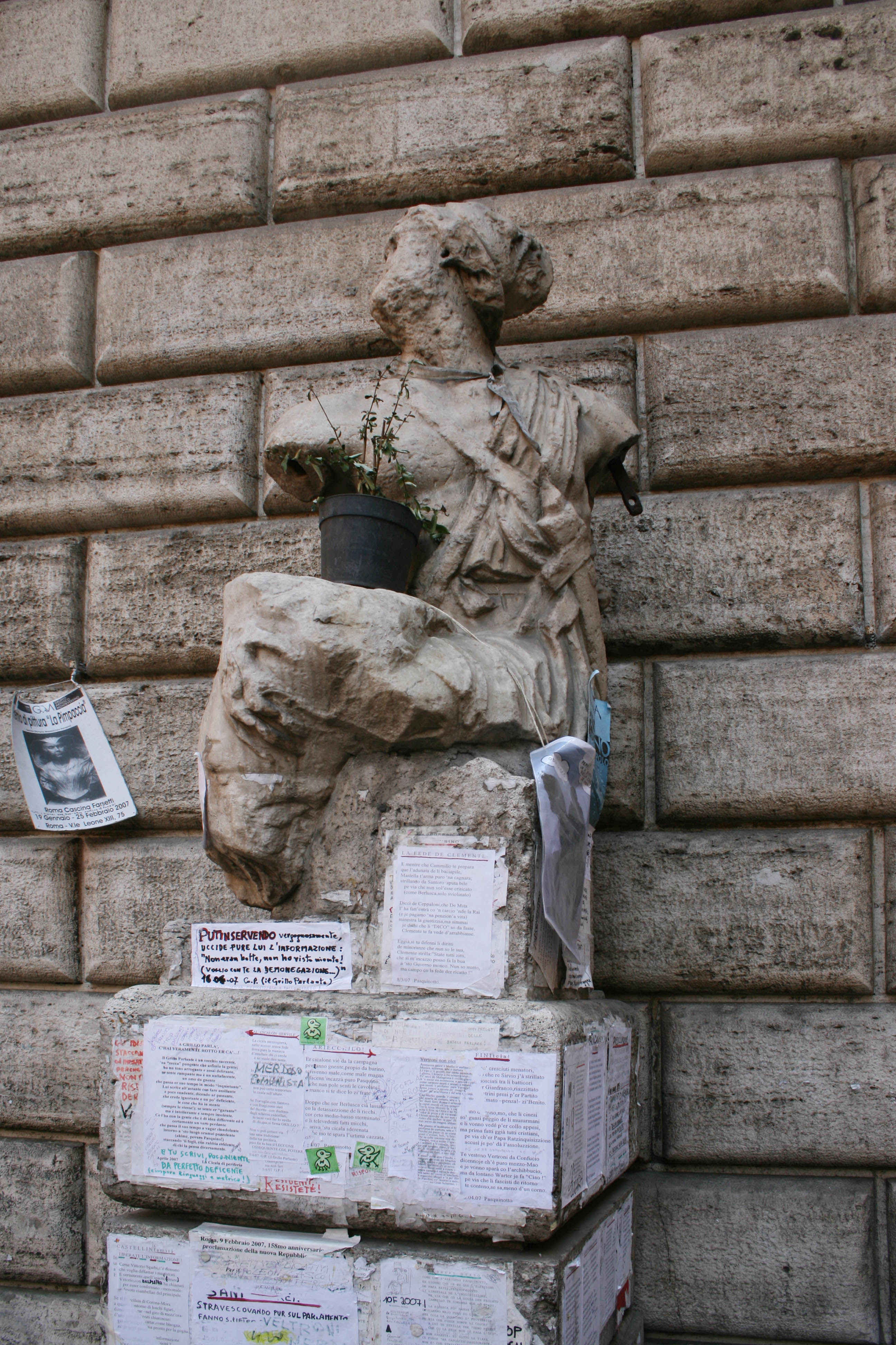 Statue parlante Pasquino à Rome